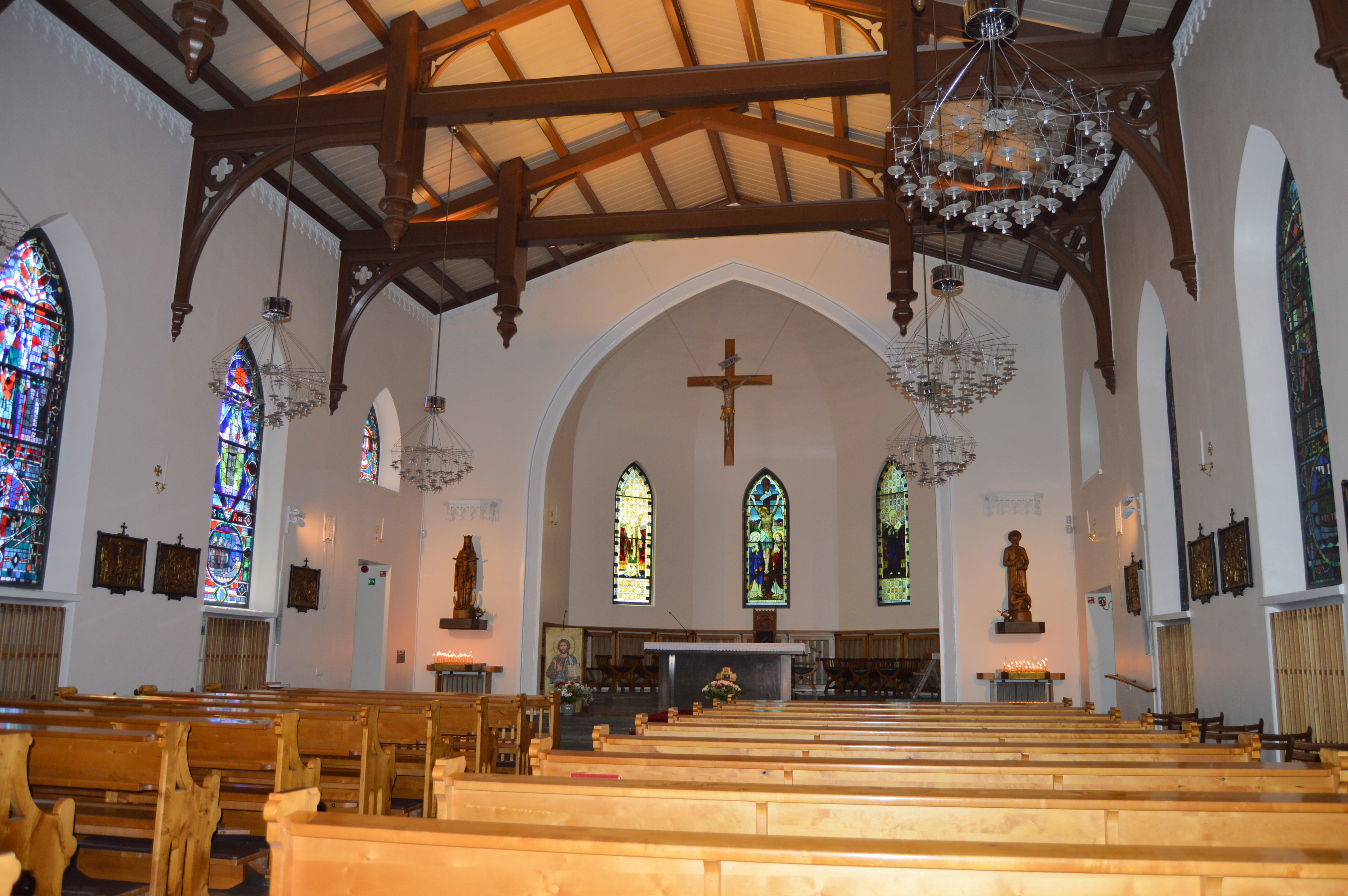 Helsingin Pyhän Henrikin katedraali